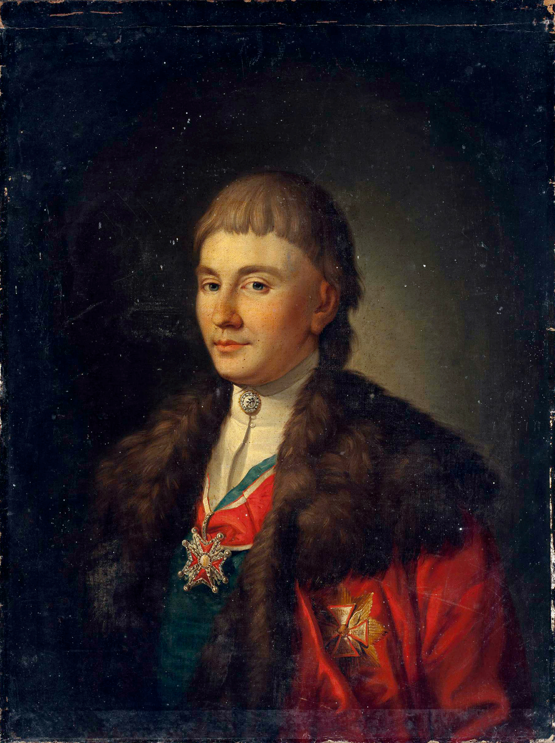 Беларуская (тарашкевіца): Партрэт Станіслава Солтана (Stanisłaŭ Sołtan)